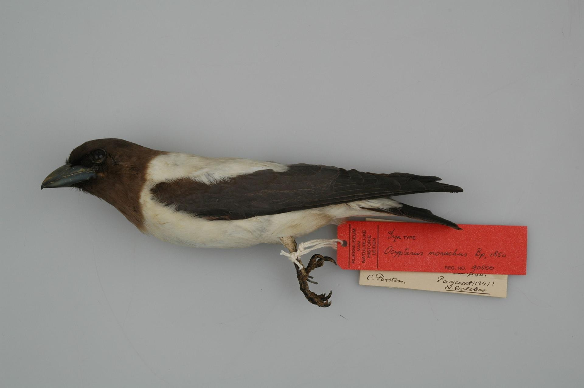 Artamus monachus Bonaparte, 1850